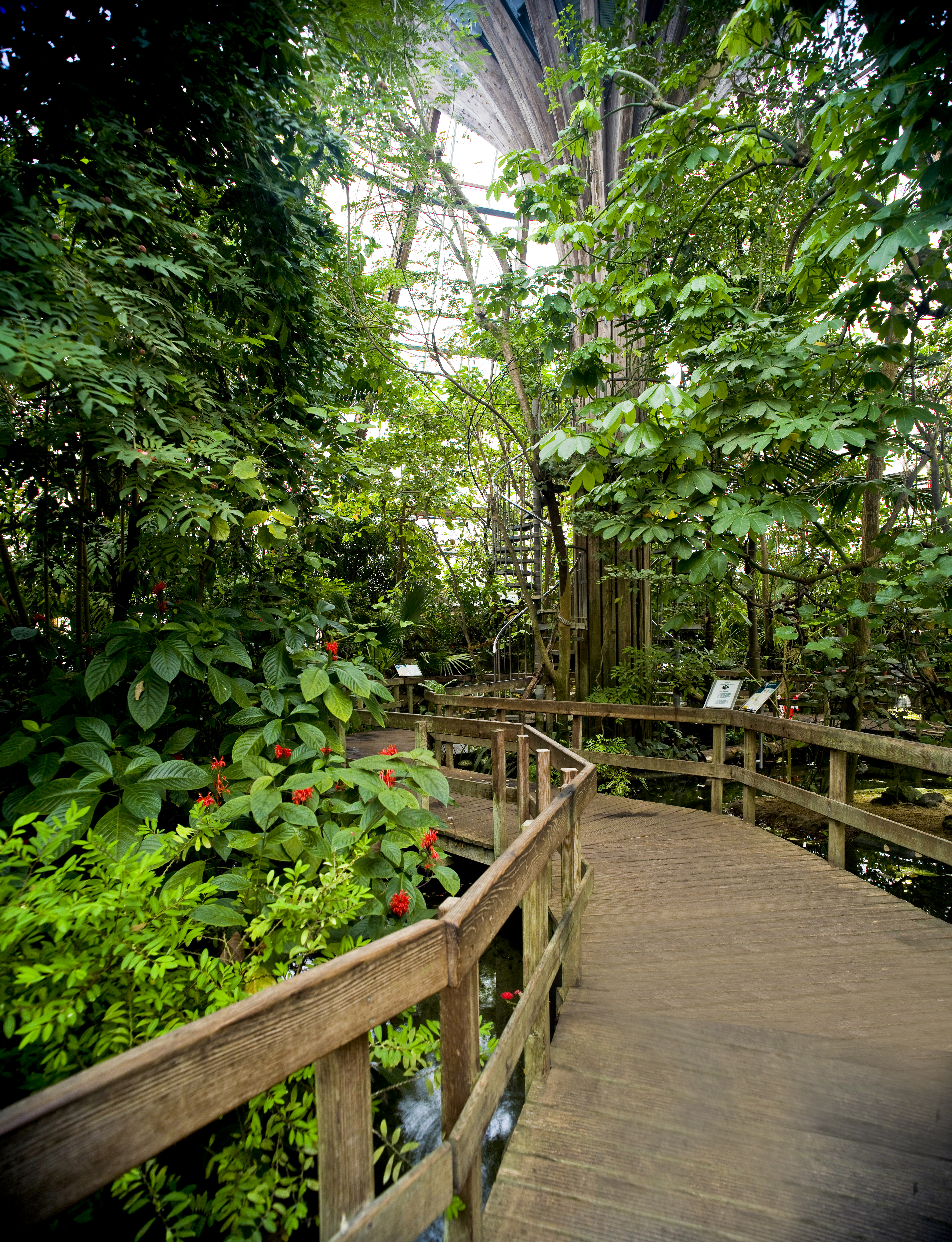 Das begehbare Regenwaldhaus im Zoo Krefeld